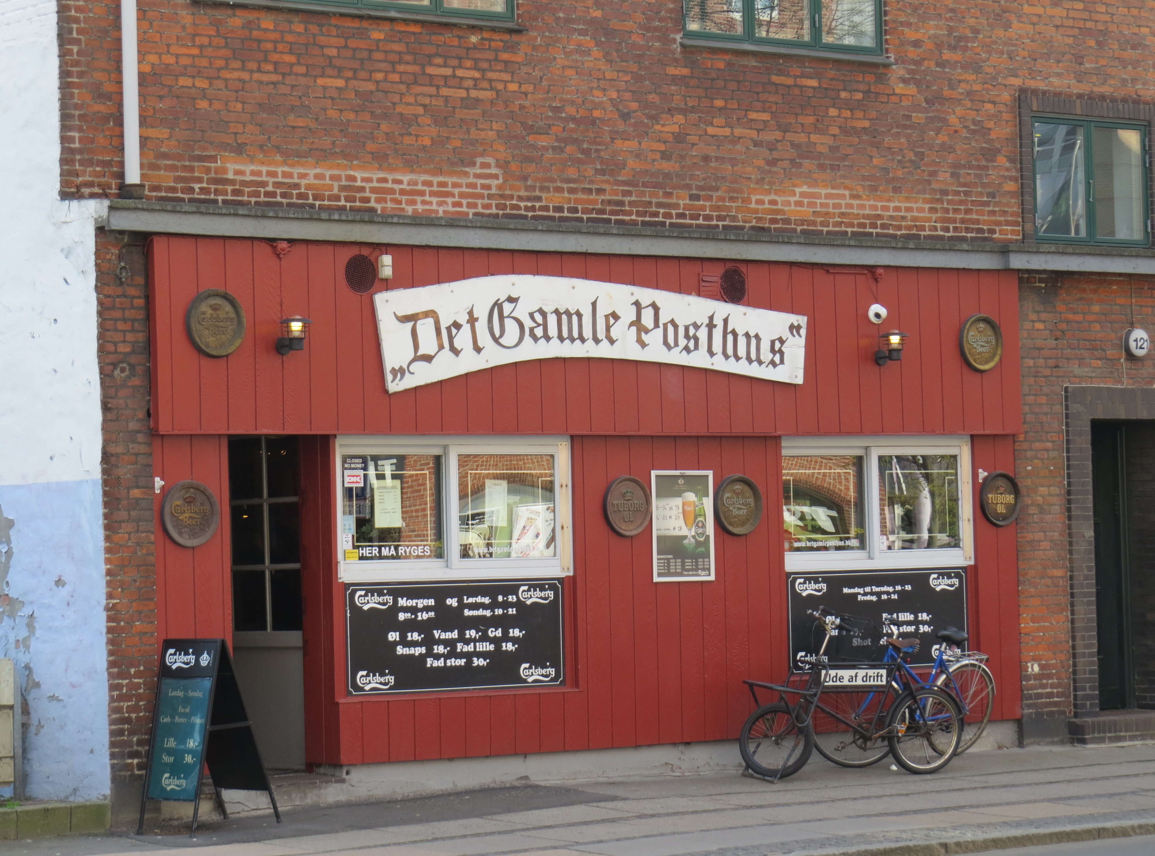 Det Gamle Posthus, København